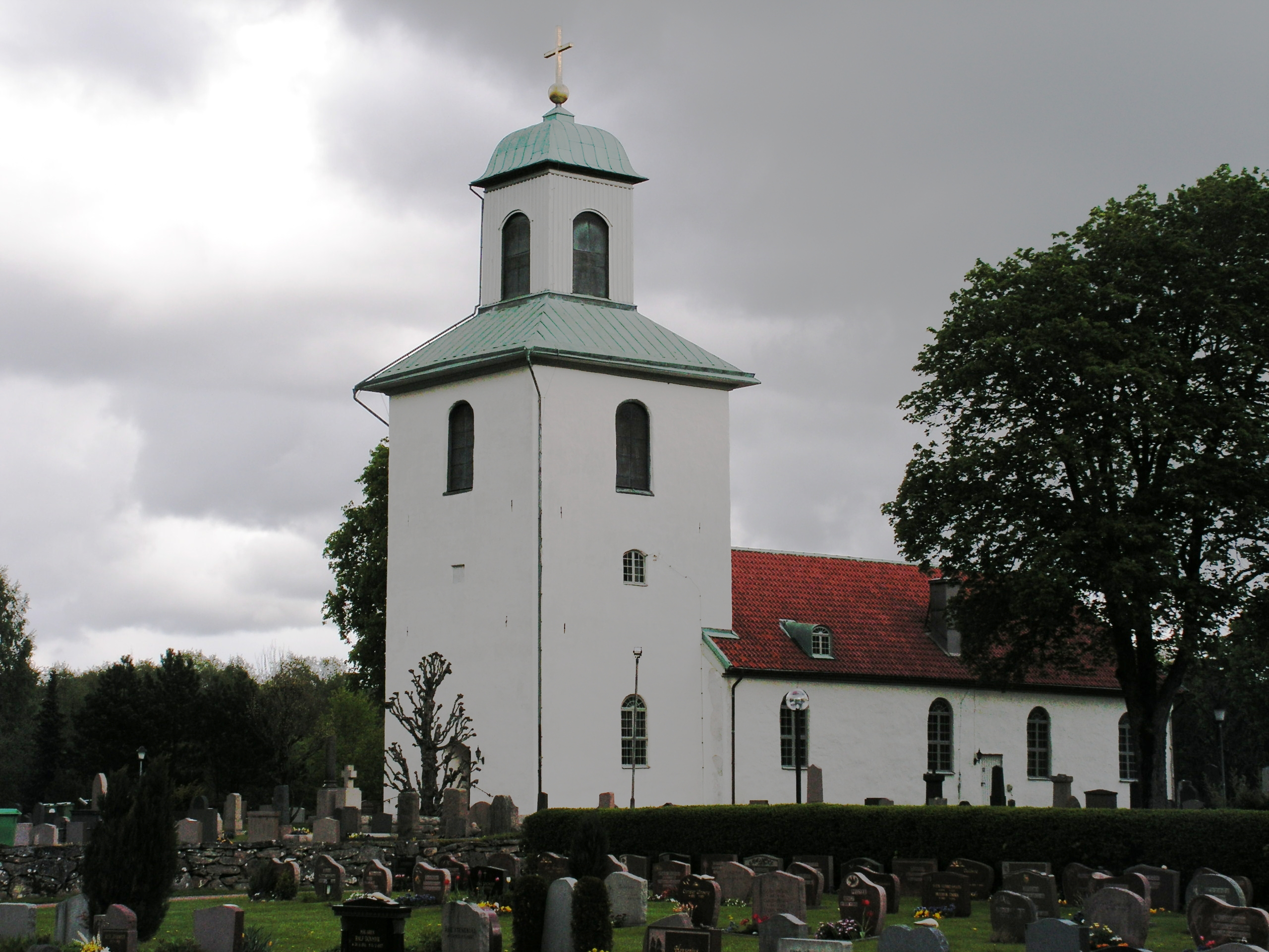 Landvetter kyrka